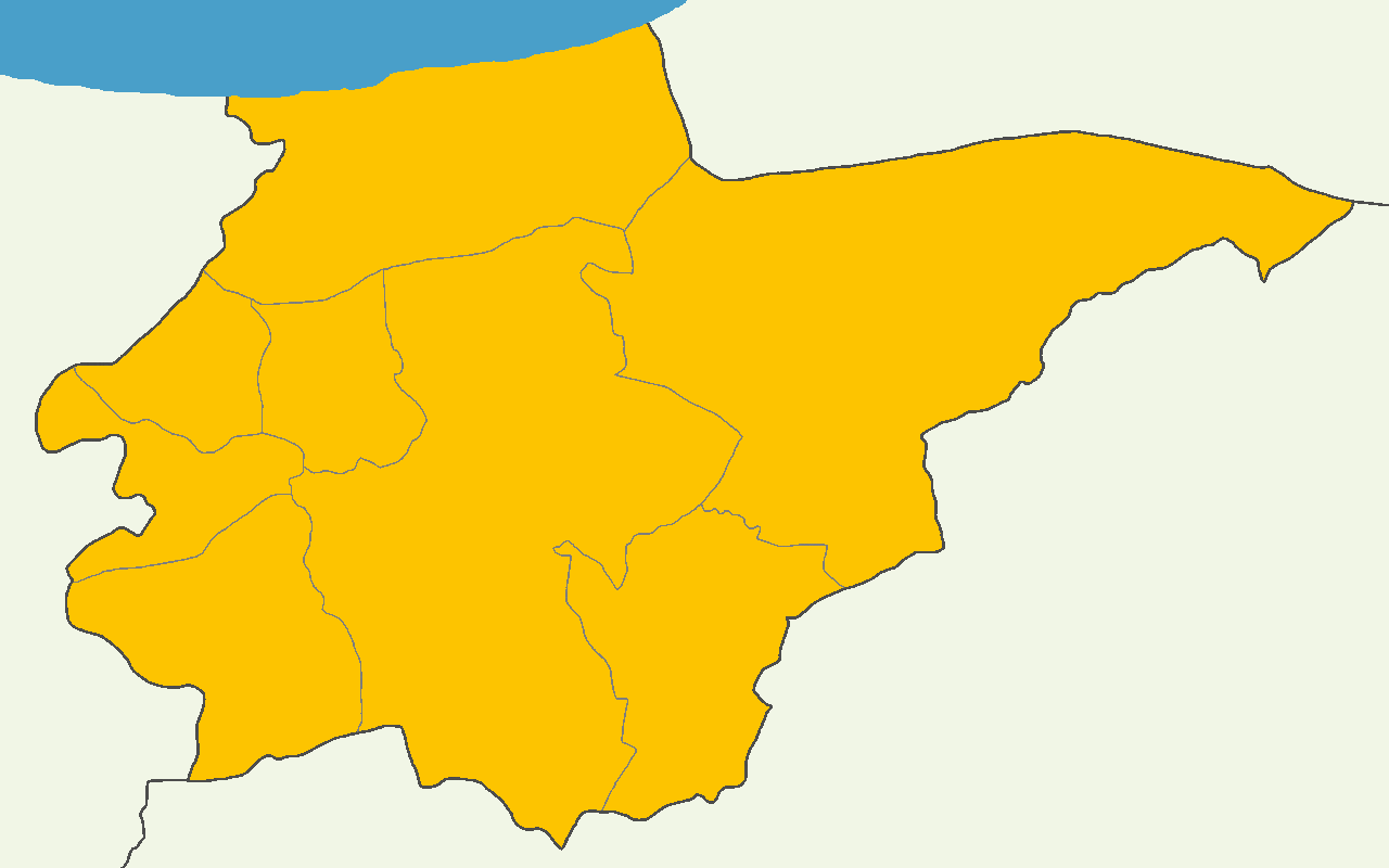 Düzce'de 2014 Türkiye cumhurbaşkanlığı seçimi sonuçları